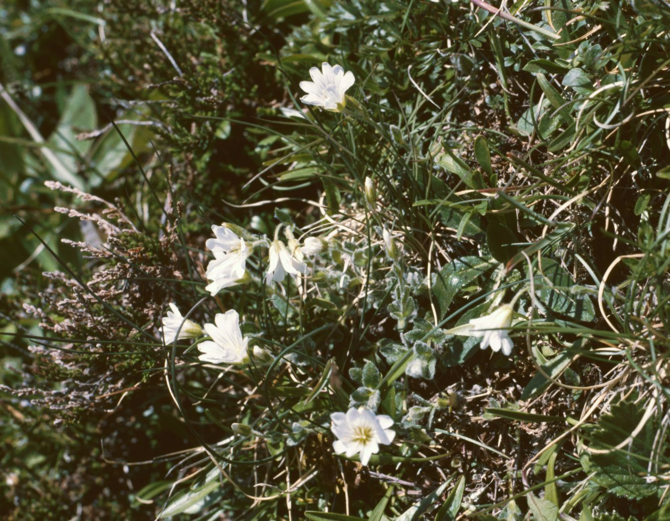 Wolliges Alpen-Hornkraut (Cerastium eriophorum), Nelkengewächse (Caryophyllaceae) - Österreich/Austria/Autriche: Steiermark, Wölzer Tauern, Zinken